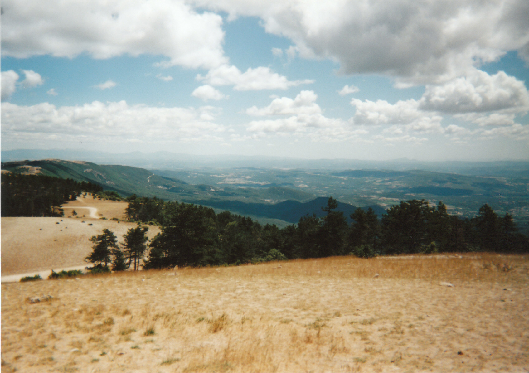 Crête du Grand Luberon